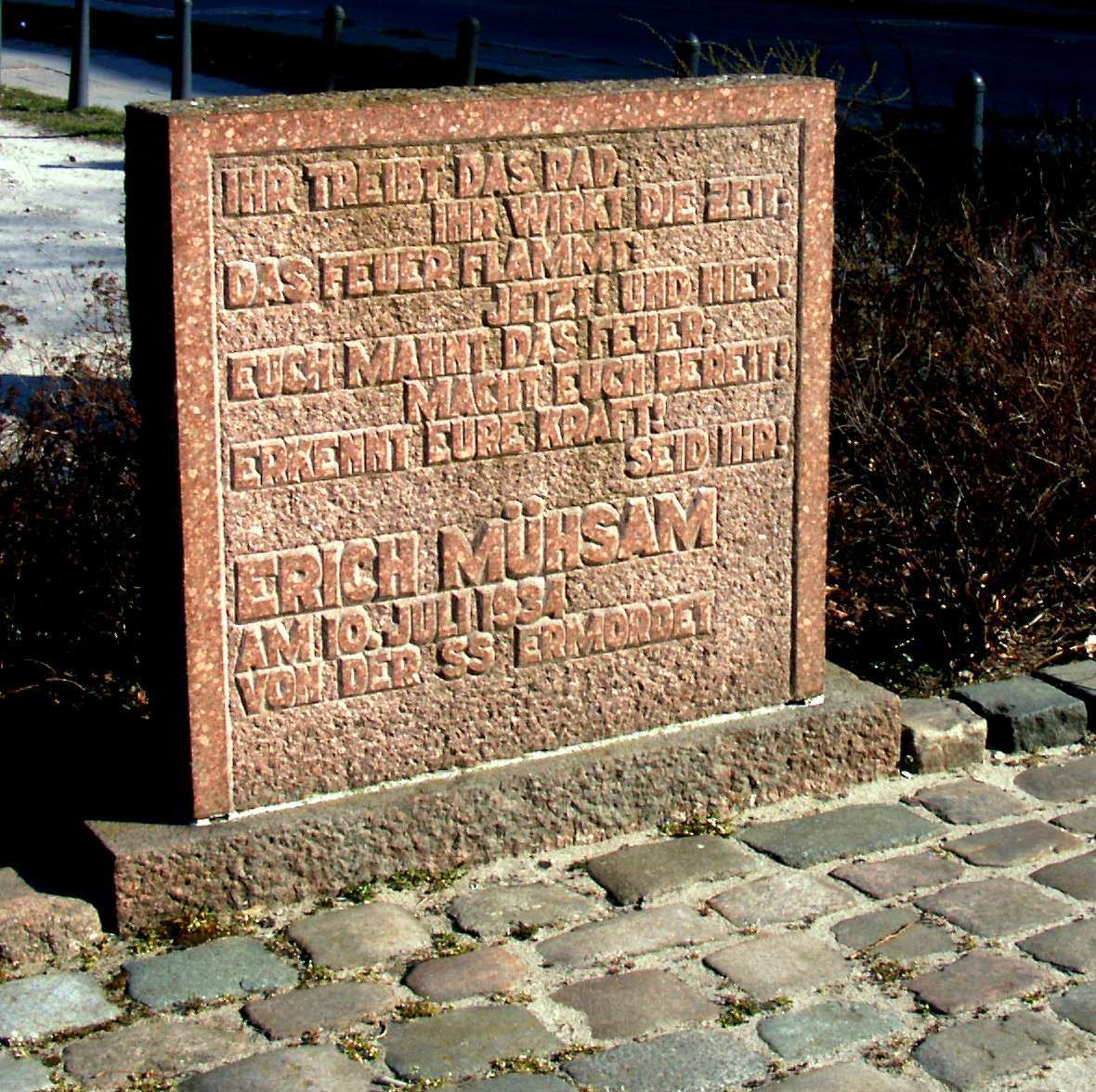 Oranienburg, Berliner Straße, Gedenkstein für Erich Mühsam.